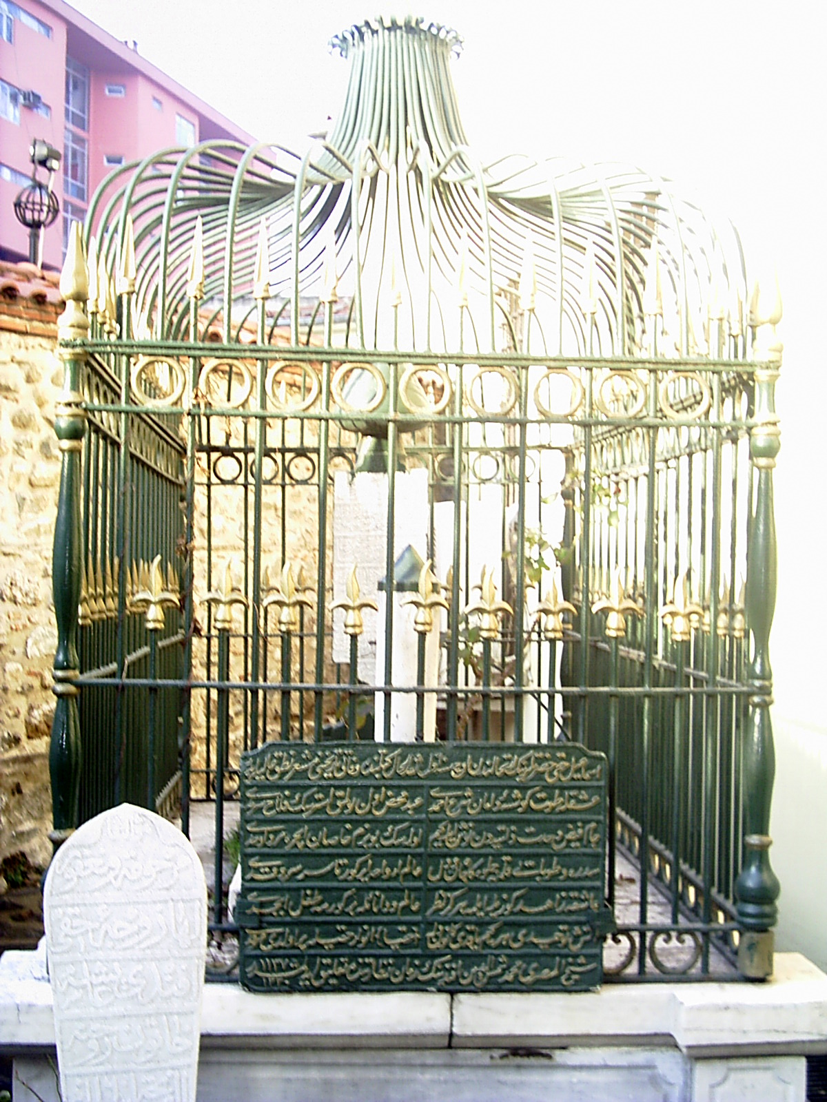 İsmail Hakkı Bursevî Tuz Pazarındaki Türbesi.